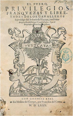 Portada de una edición del Fuero de Vizcaya, impresa en Medina del Campo en 1575 (Madrid, Biblioteca del Senado).